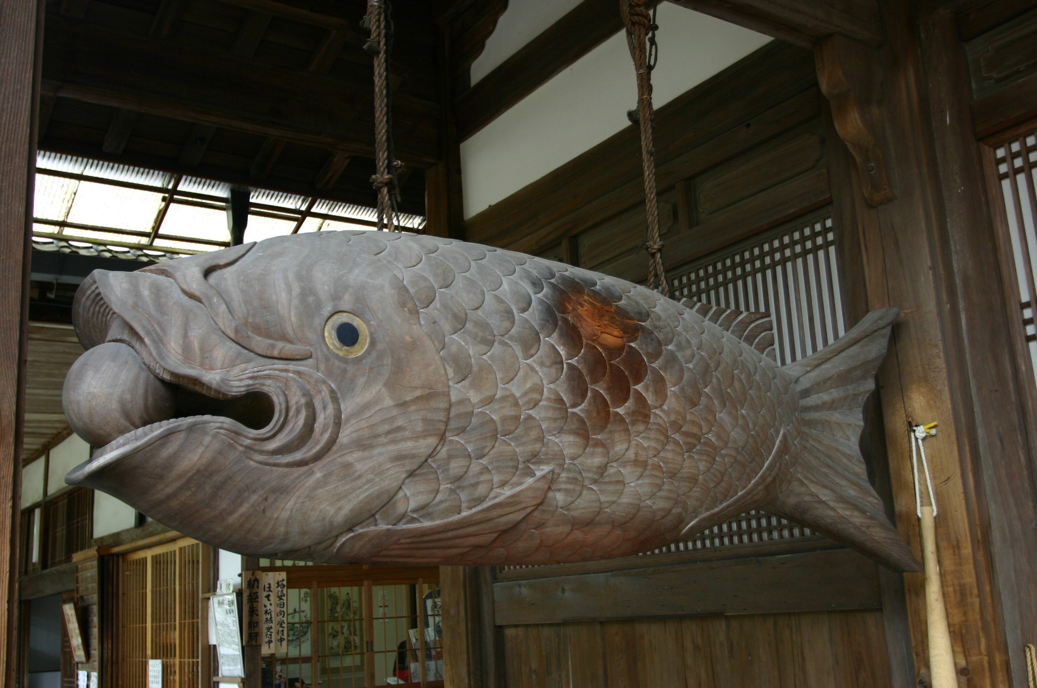 Wooden plate